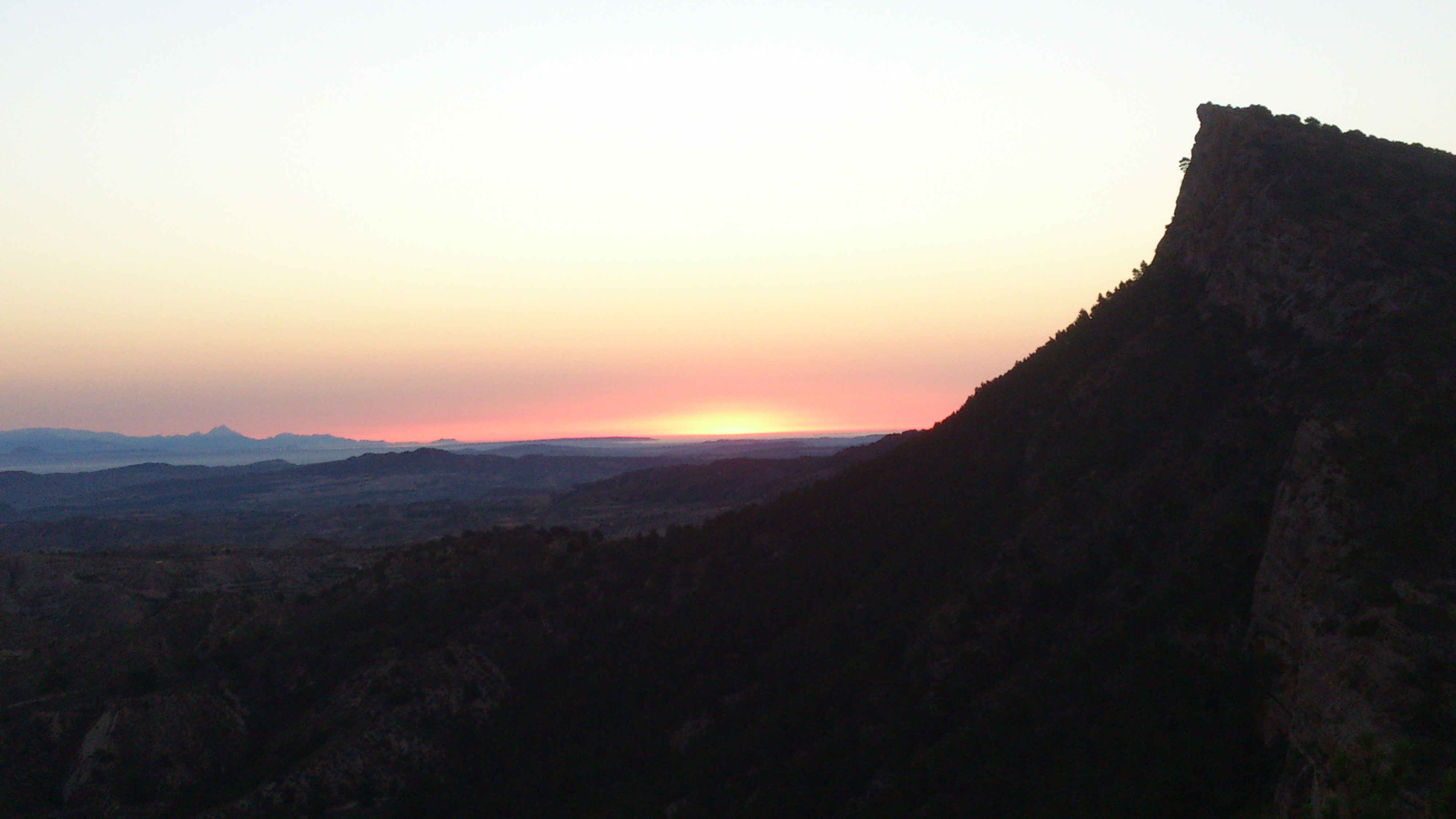 Sierra Columbares, Murcia, España